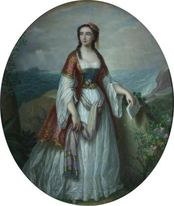 Petre Mateescu - Dora d'Istria, ulei pe pânză, Muzeul Naţional de Artă al României, Bucureşti